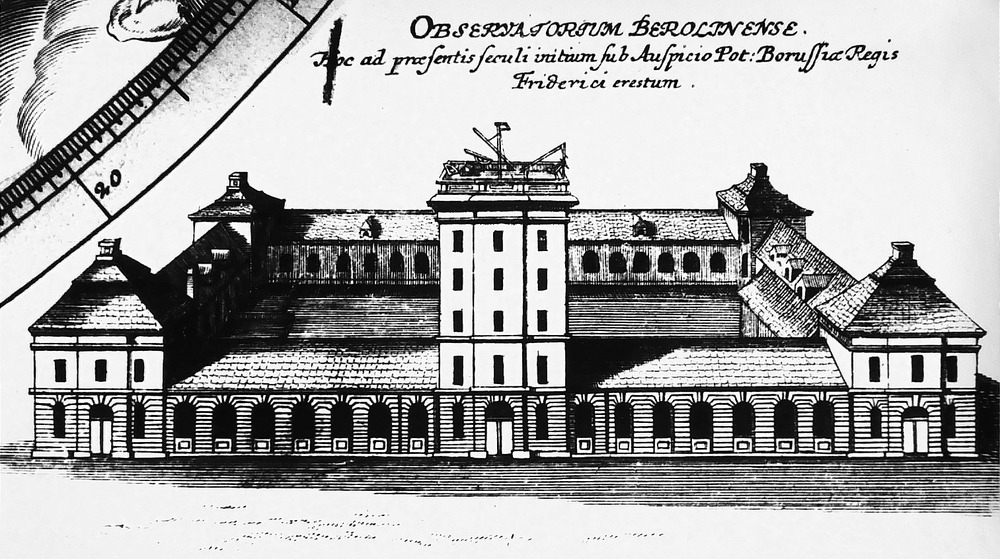 Detail der Tafel 19, die südliche Himmelssphäre, aus dem Atlas Coelestis von Johann Gabriel Doppelmayr, (1742, Homännische Erben, Nürnberg), rechts unten: Die alte Berliner Sternwarte. Vermutlich Scan eines Exemplars im Besitz des Leibniz-Instituts für Astrophysik Potsdam